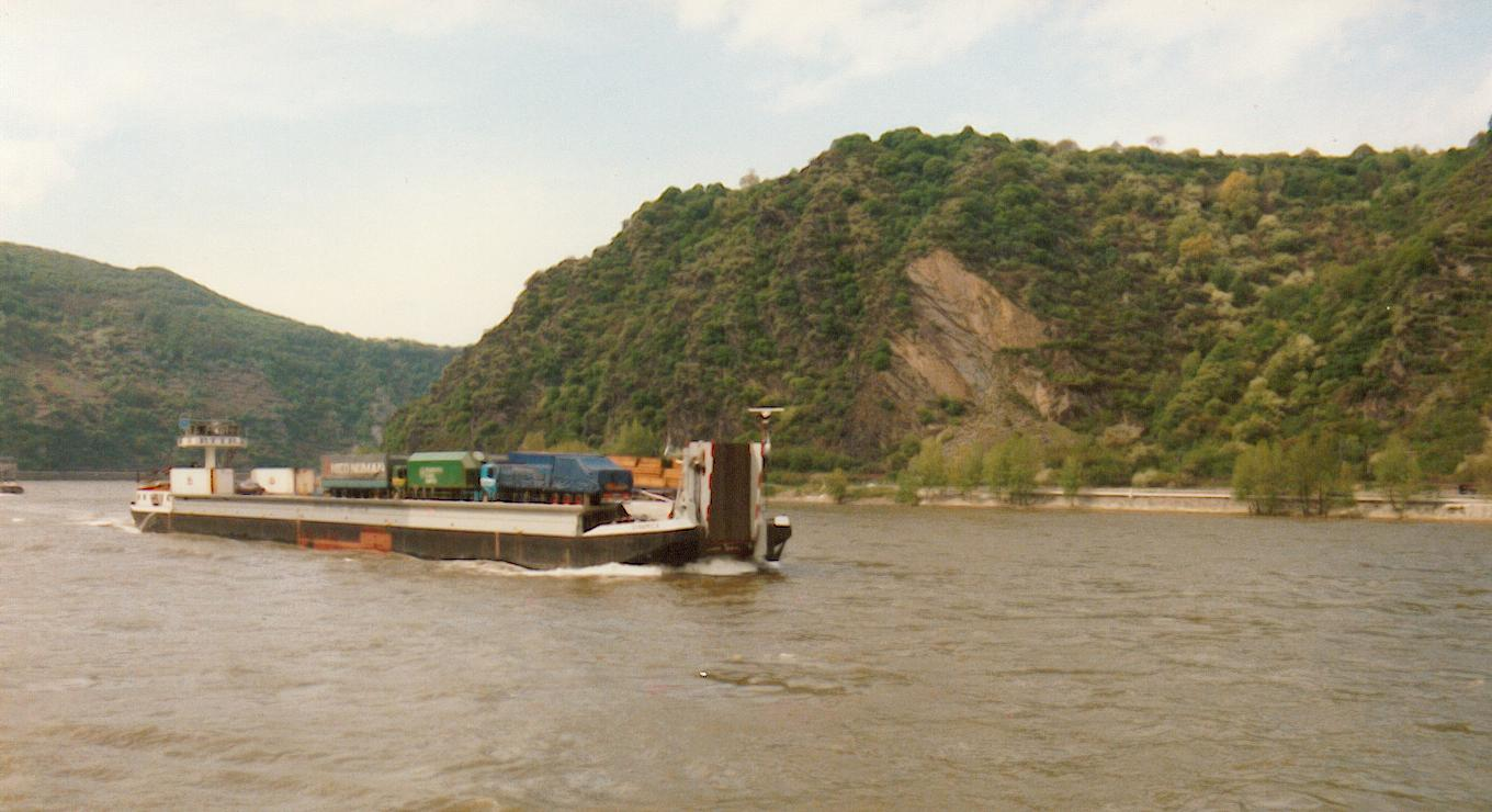 Ro-Ro-Schiff an der Loreley